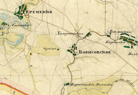 Тамбовская губерния, карта Менде 1862, Ряд VIII, Лист 3